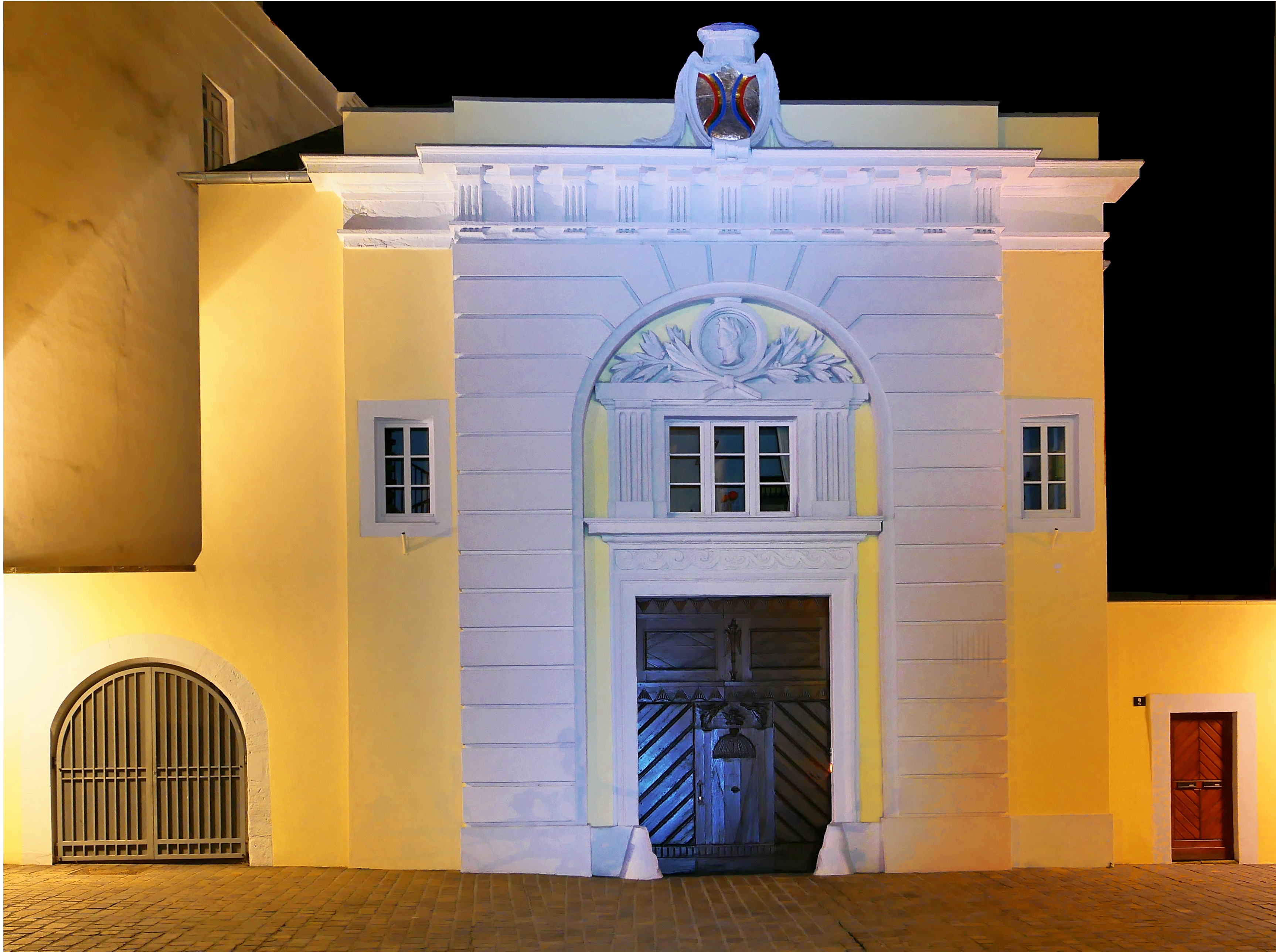 Die sogenannte Geel Box. Trier,Domfreihof 2: sogenannte Philippskurie; zweiteiliges barockes Wohnhaus, 1750er Jahre, Architekt wohl Johannes Seiz; Ausstattung; im Kern romanische Kelleranlage; frühklassizistisches Torhaus, um 1780, Architekt wohl Johann Anton Neurohr